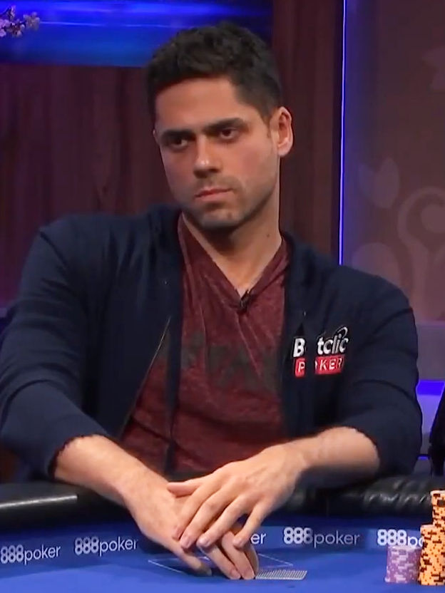 Benjamin Pollak bei den US Poker Open 2018